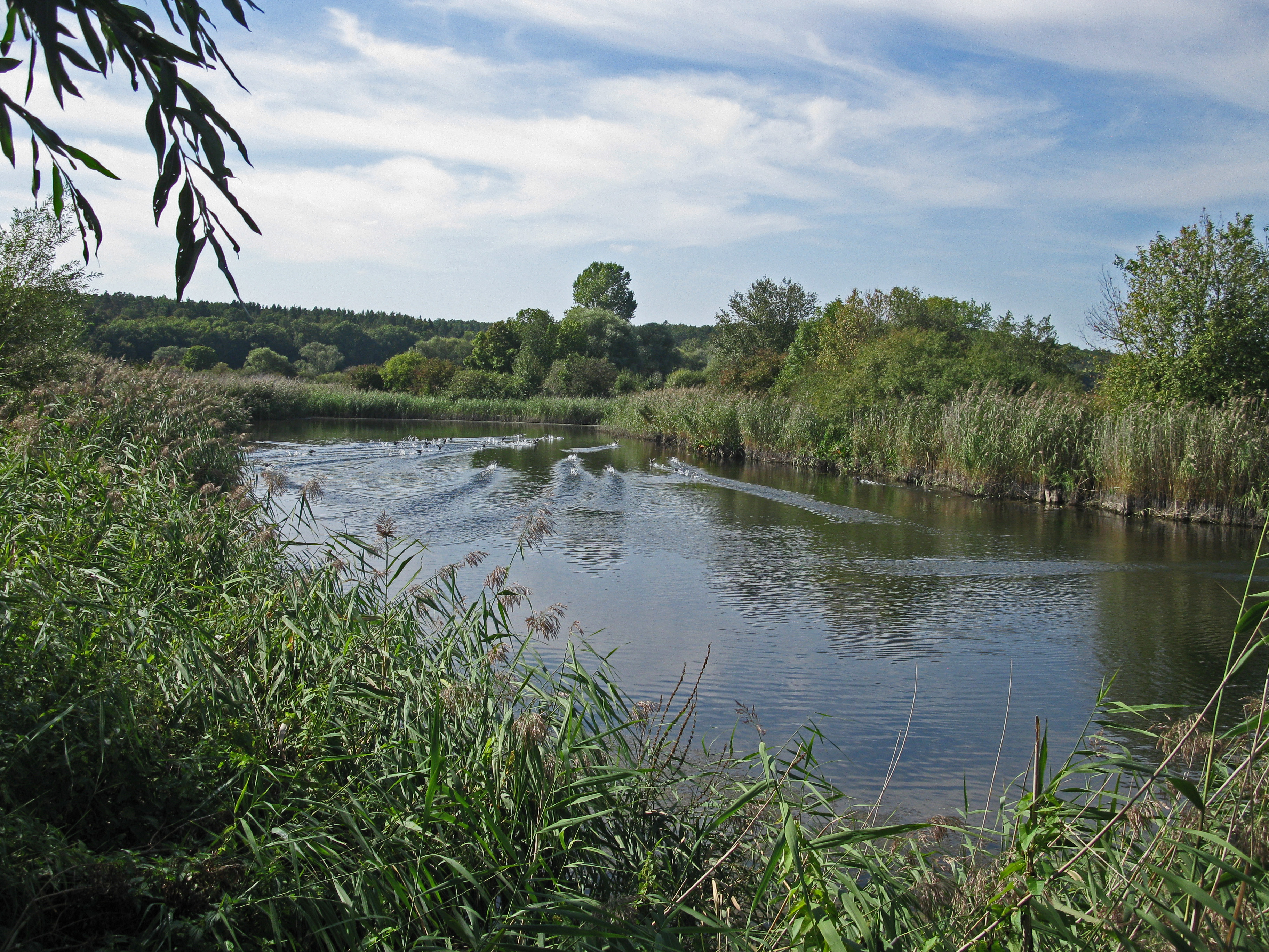 Sichelsee im NSG Mainaue bei Augsfeld